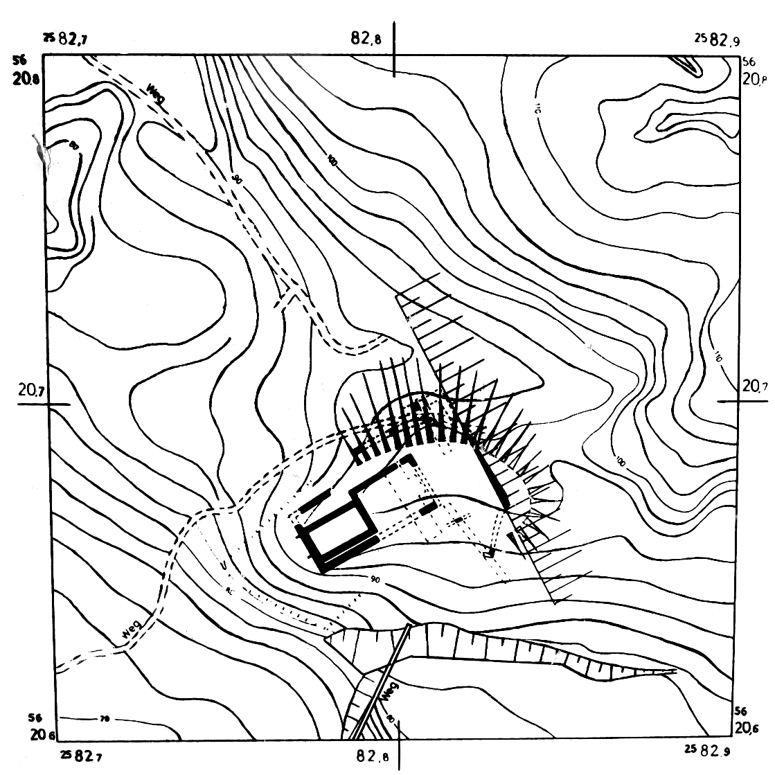 Informationstafel Steiner Häuschen. Ausschnitt aus file:Steinerhaeuscheninfo.jpg